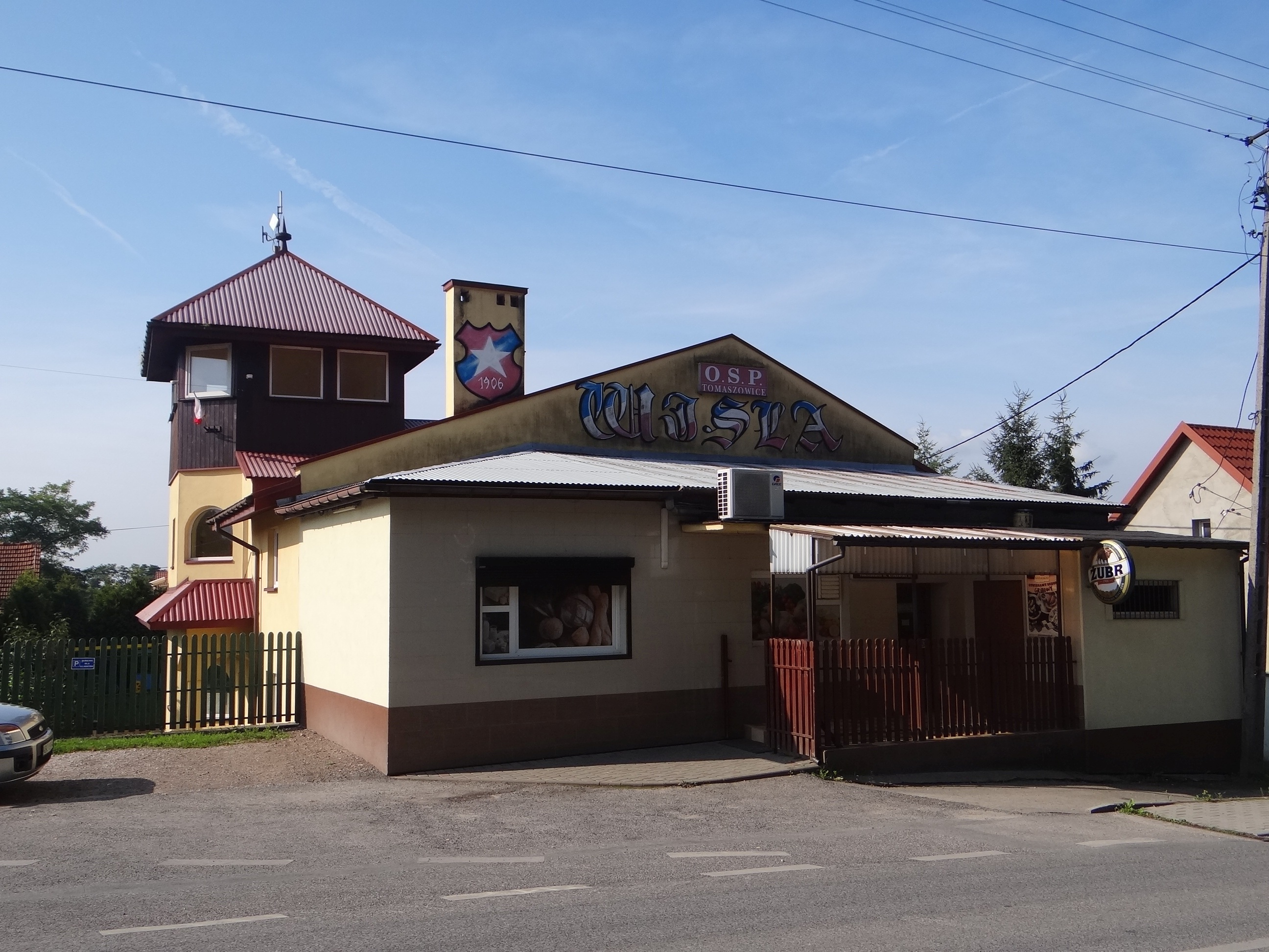 Remiza OSP w Tomaszowicach